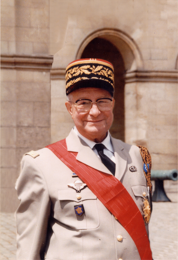 Général Jean Compagnon (C.R.)